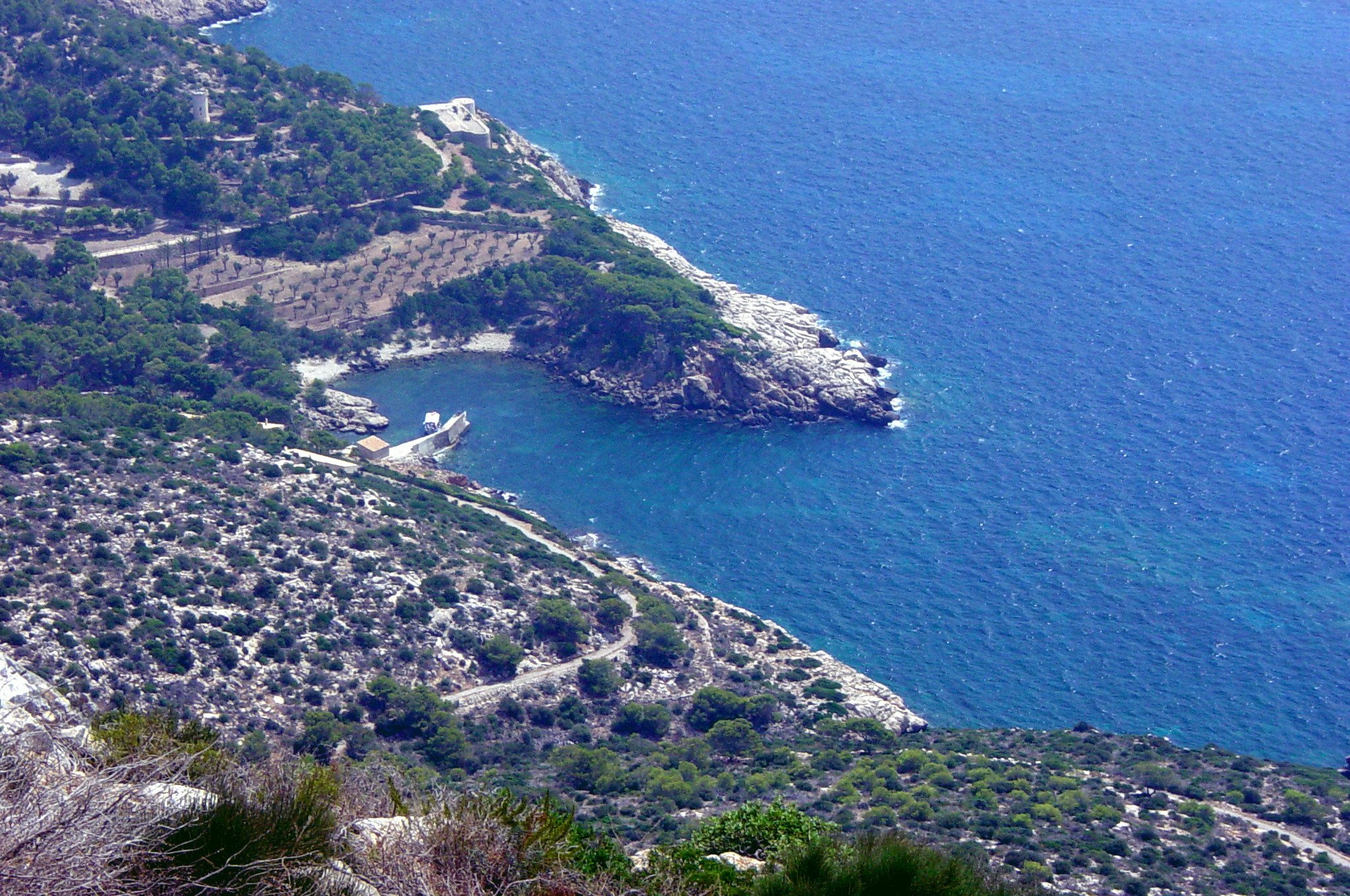 Naturhafen Sa Dragonera, Cala Lladro